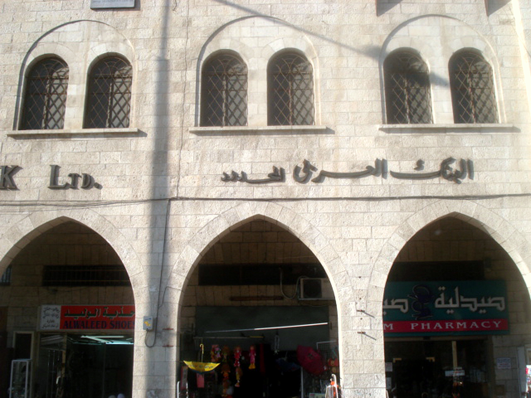 Arab Bank LTD. Jerusalem